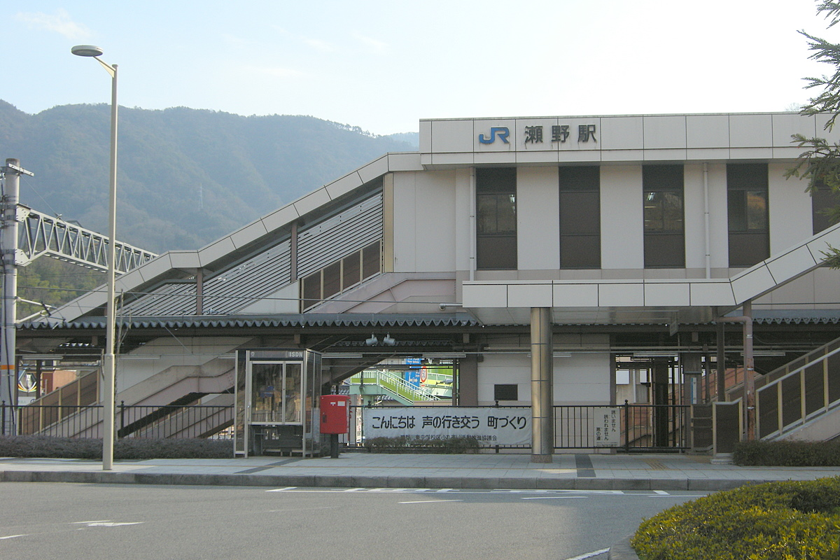 瀬野駅 Seno station